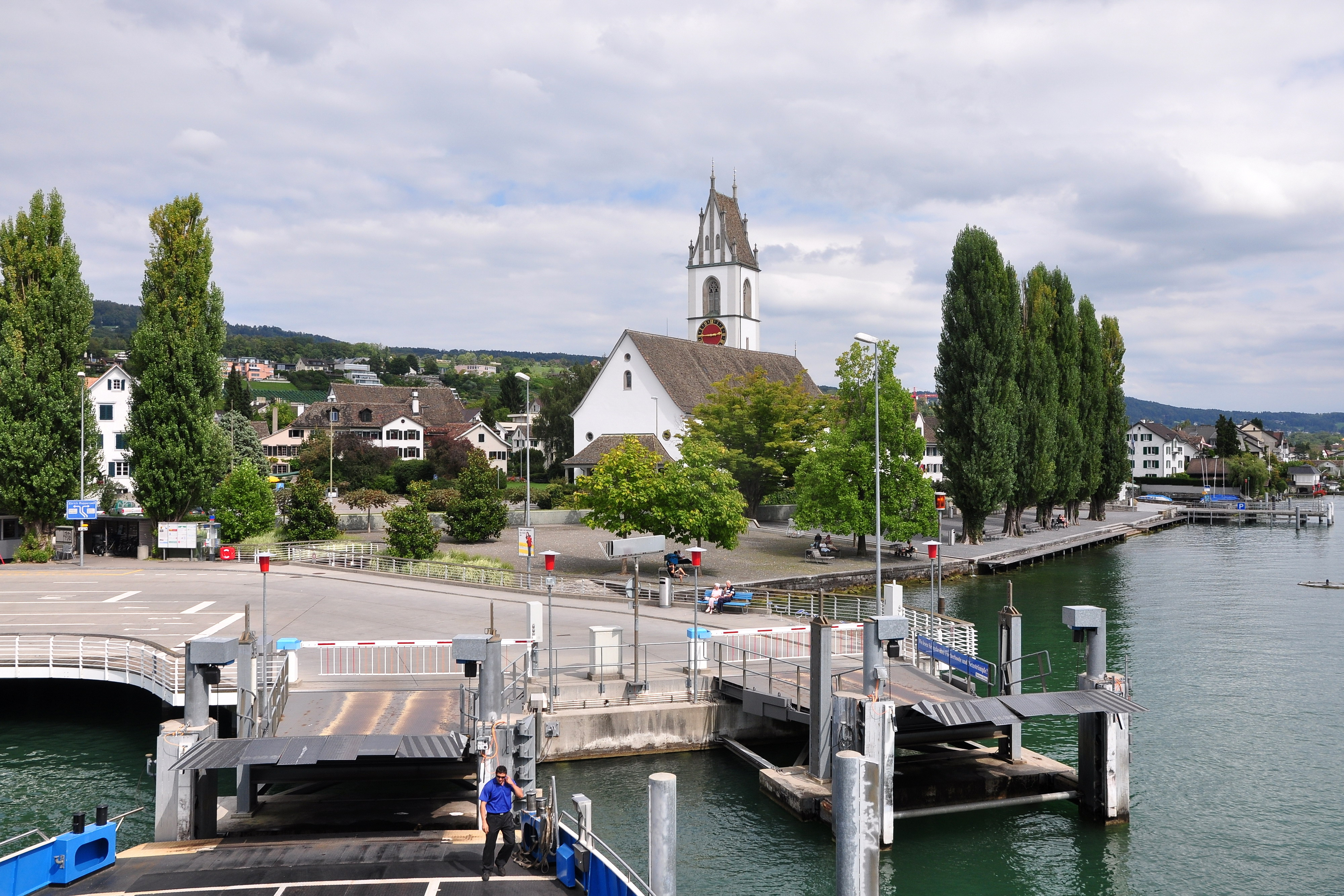 Zürichsee-Fähre in Meilen (Switzerland)